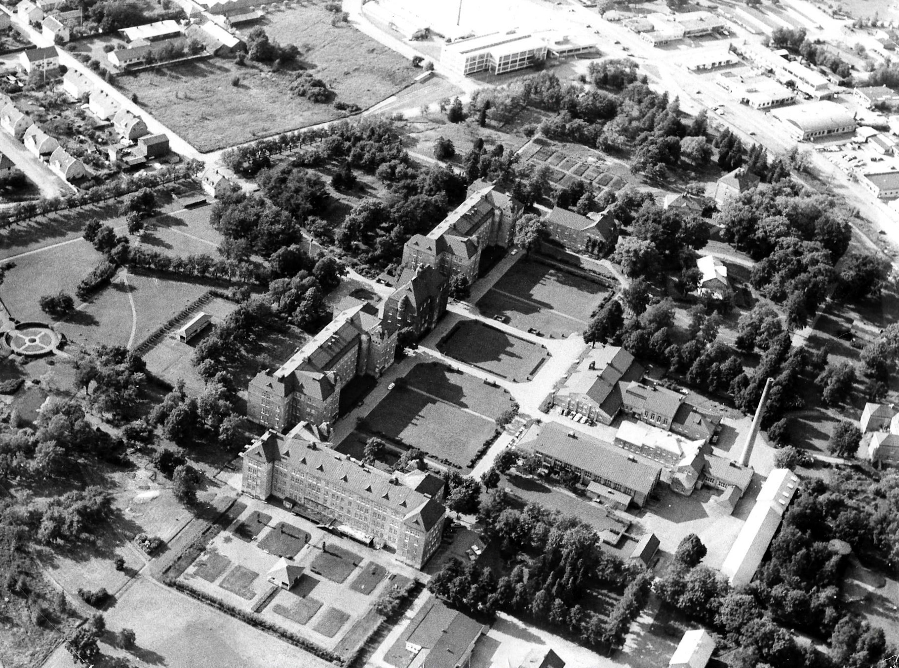 Flygbild över Västgöta regementes före detta kaserner i Vänersborg. Kasernerna kom från 1930 att husera Källhagens sinnessjukhus (från 1971 Norra klinikerna) fram till 1988.